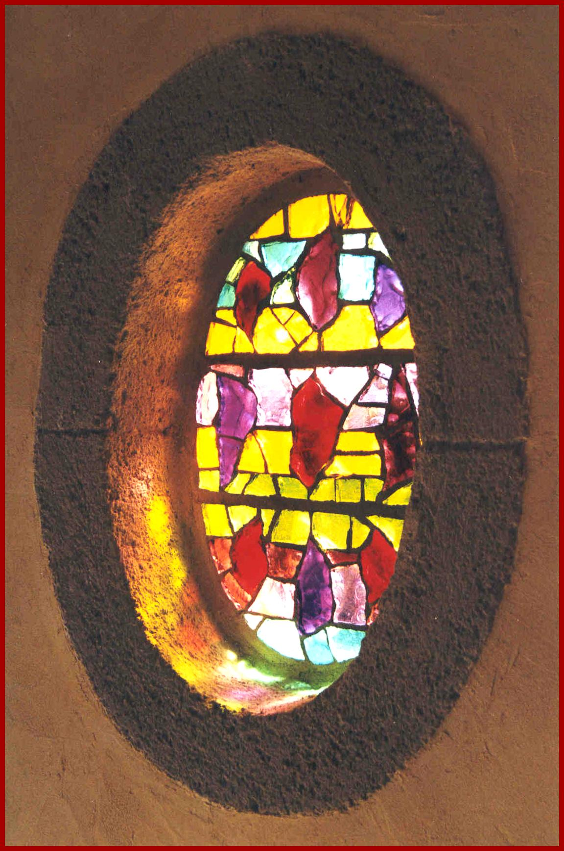 Préciser le lieu